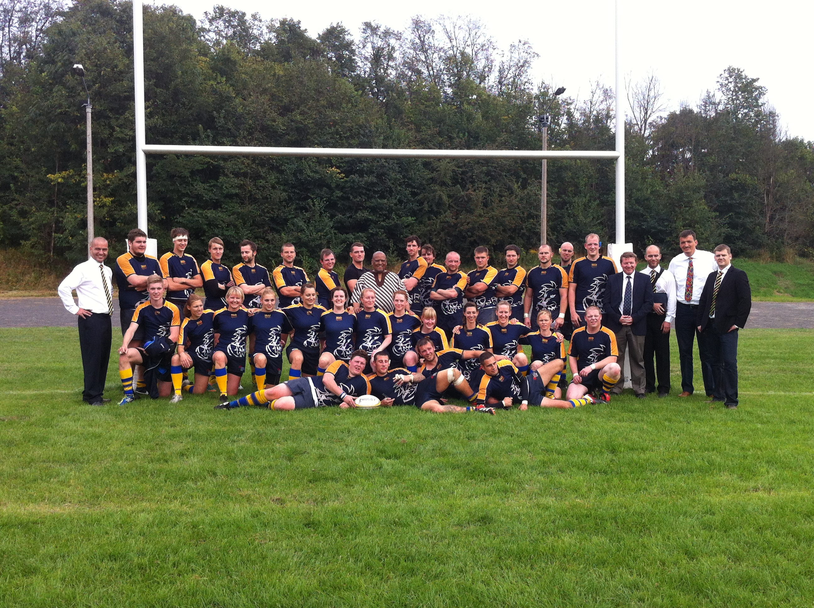 Männer- und Frauenmannschaft des Rugby Club Leipzig